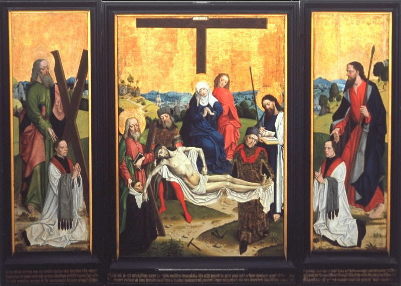 Flügelaltar mit Kreuzabnahme (Triptychon), Innenseite